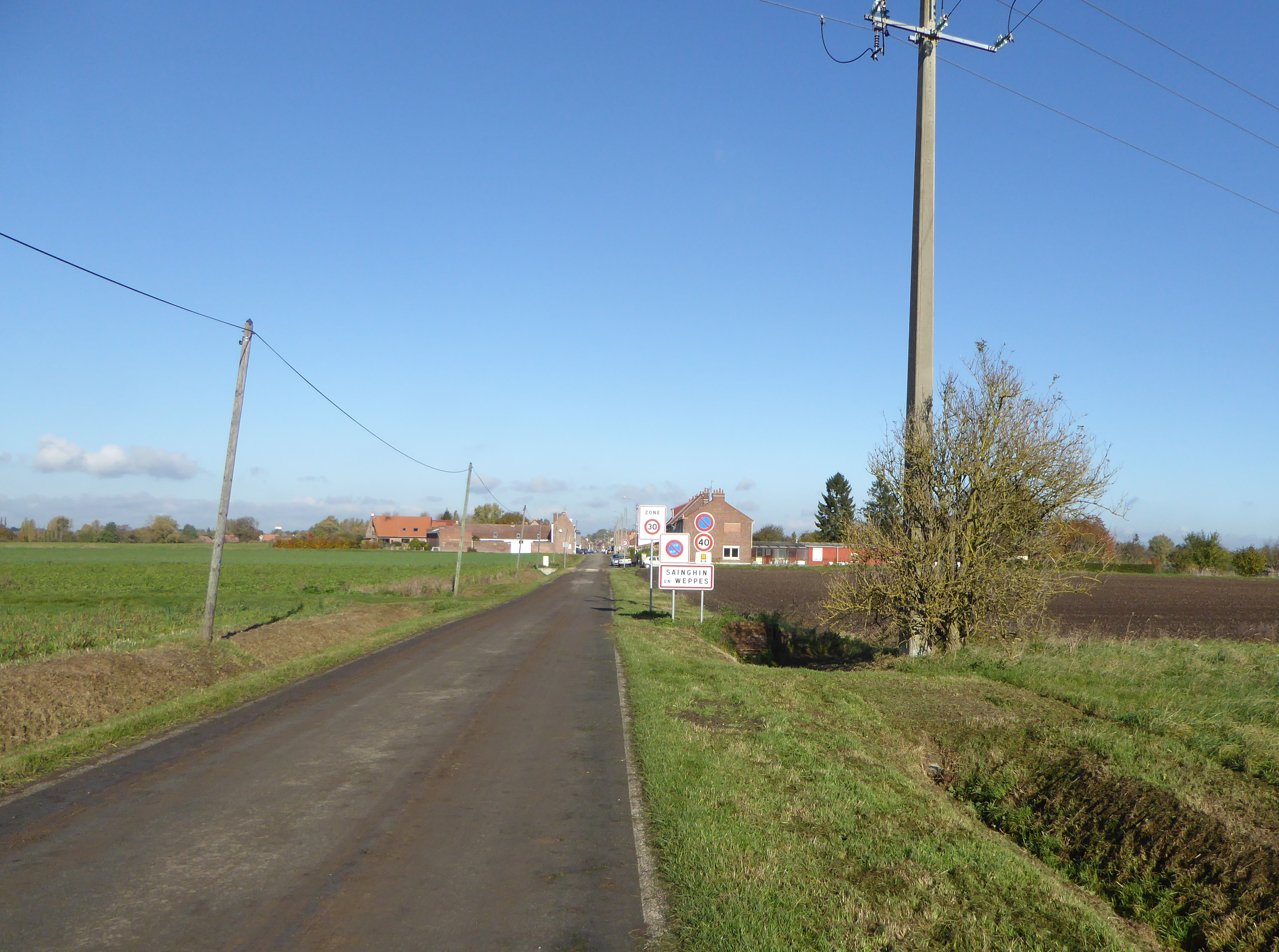 Sainghin-en-Weppes Nord France